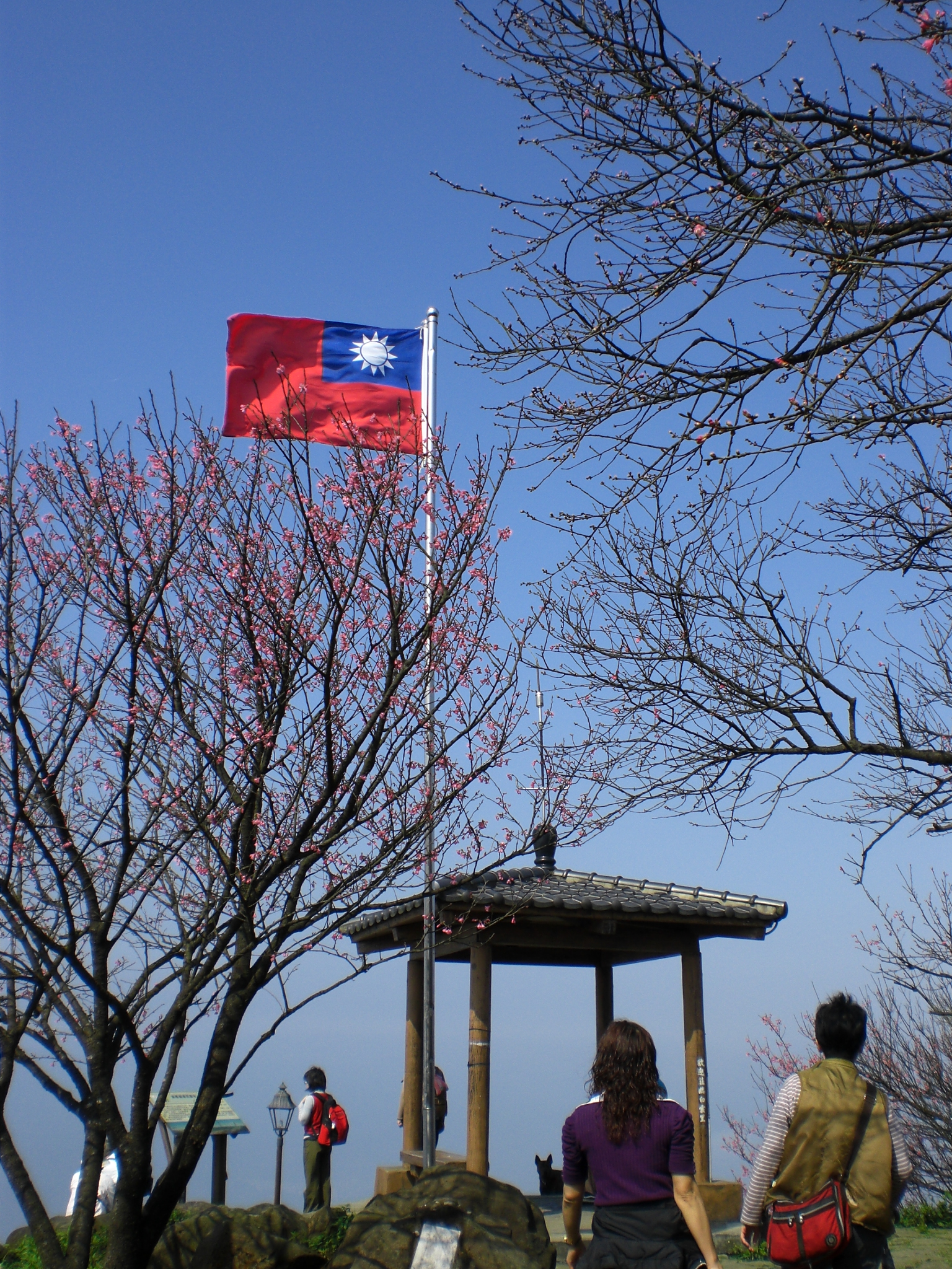 中文（台灣）: 新北市汐止區大尖山頂，設置涼亭與升起中華民國國旗。